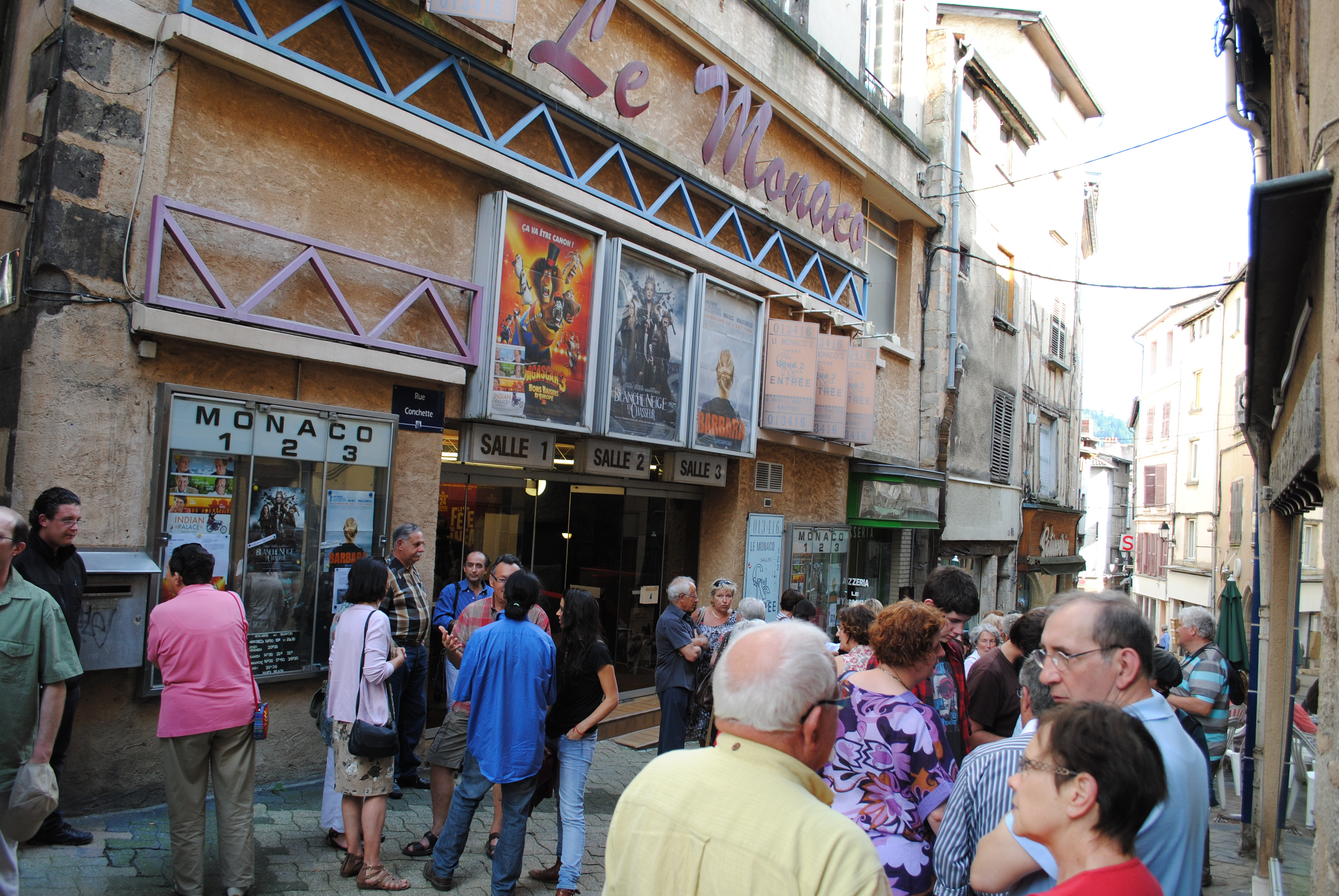 Cinéma le Monaco à Thiers